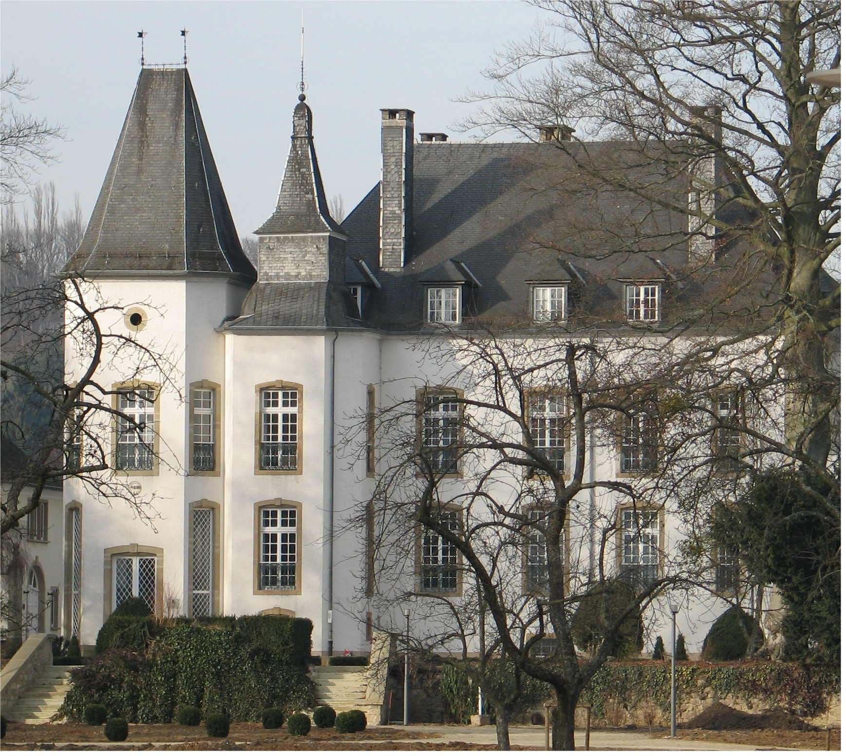 D'Schlass vu Mënsbech